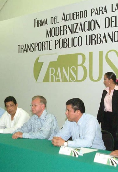 El entonces Gobernador Andrés R. Granier en la firma del convenio creador del sistema Trnasbús.